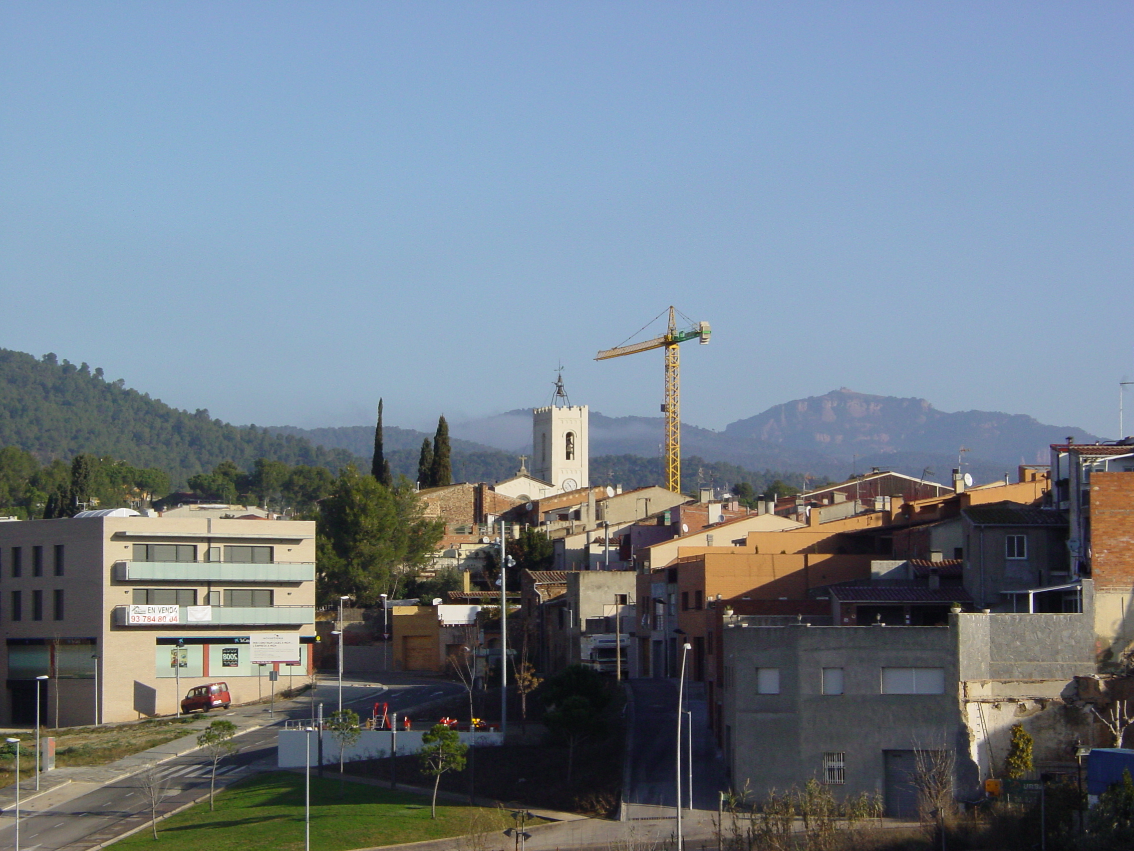 Vista general de Viladecavalls